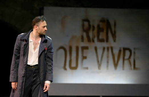 avignon